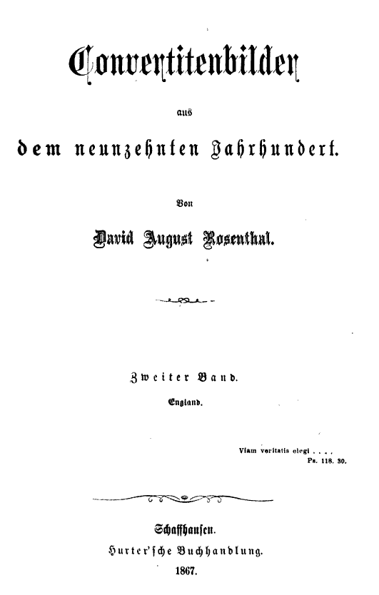 David August Rosenthal deutsch-jüdischer Konvertit, Arzt und Publizist, Titelblatt eines Werkes